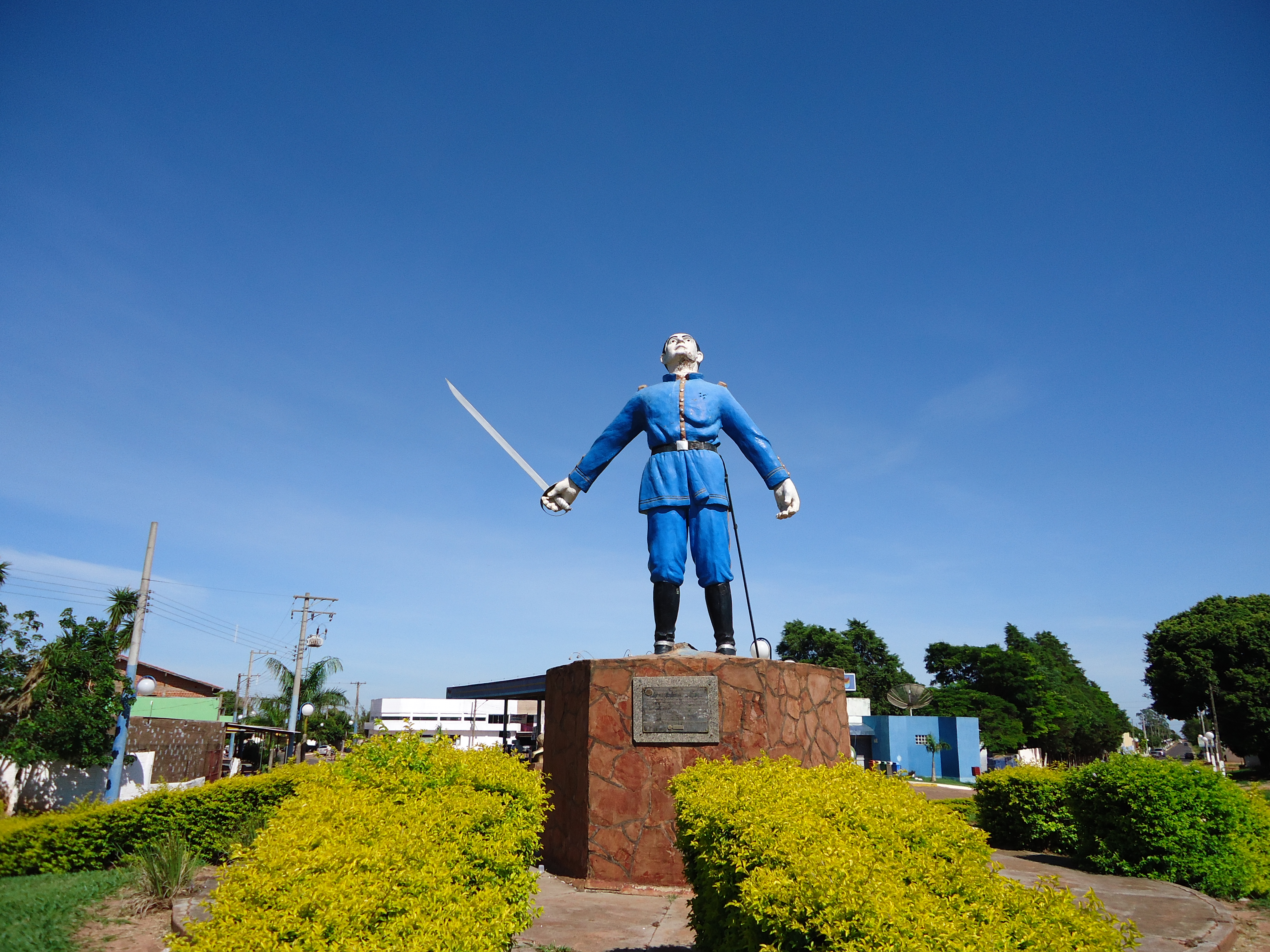 Estátua de Antonio João Ribeiro, herói da Guerra do Paraguay inaugurada em 18 de março de 1999 pelo então prefeito Dácio Queiroz.